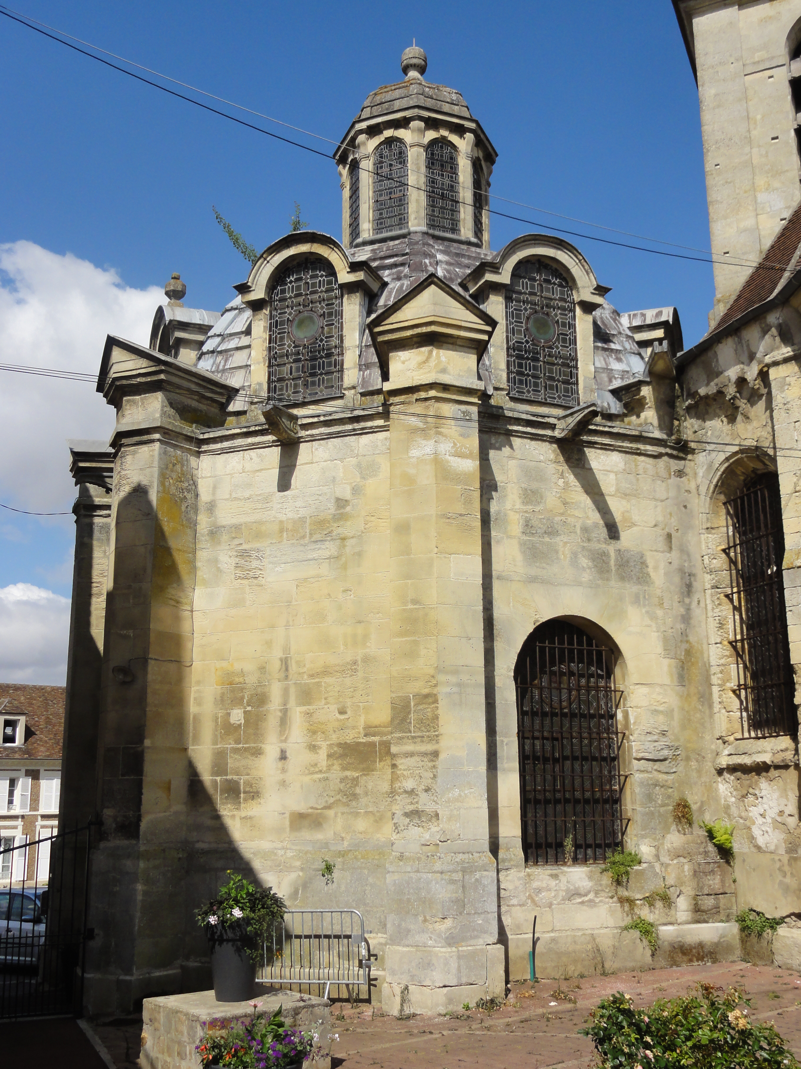 Église Saint-Rémi de Marines (voir titre).